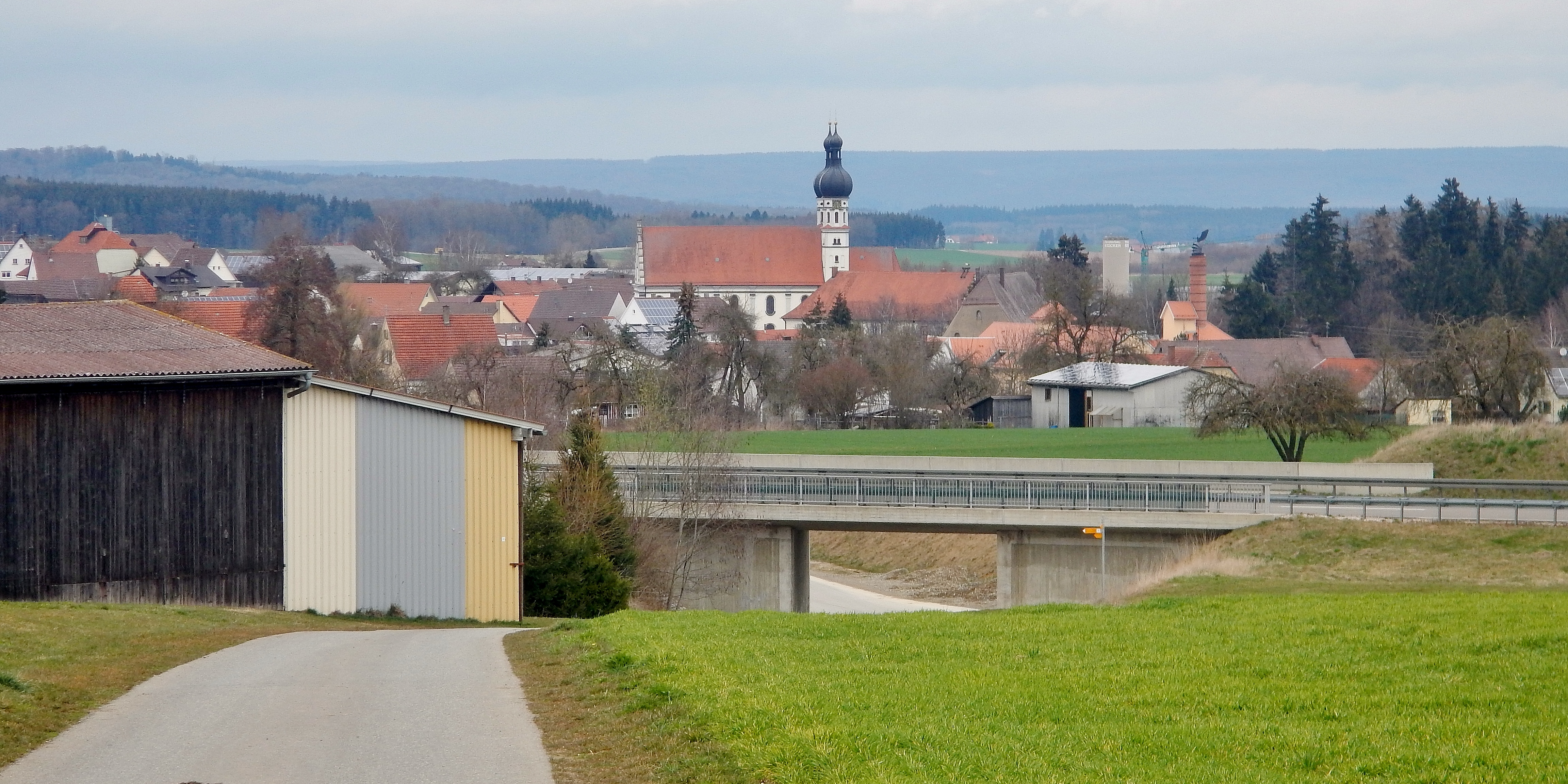 Schwäbische-Alb-Oberschwaben-Weg (HW 7): Blick zur Pfarrkirche St. Simon & Judas in Uttenweiler